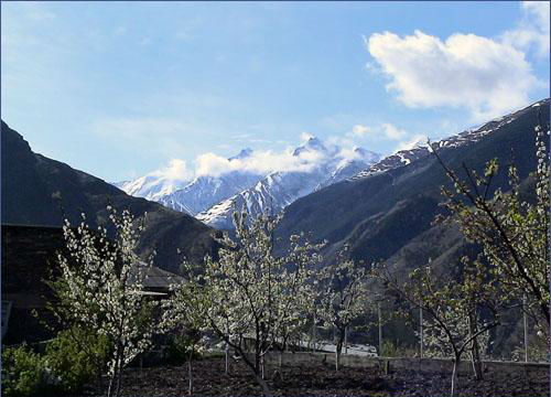 Обзор горы Адалла-Шухгельмеэр с Нижнего Гаквали